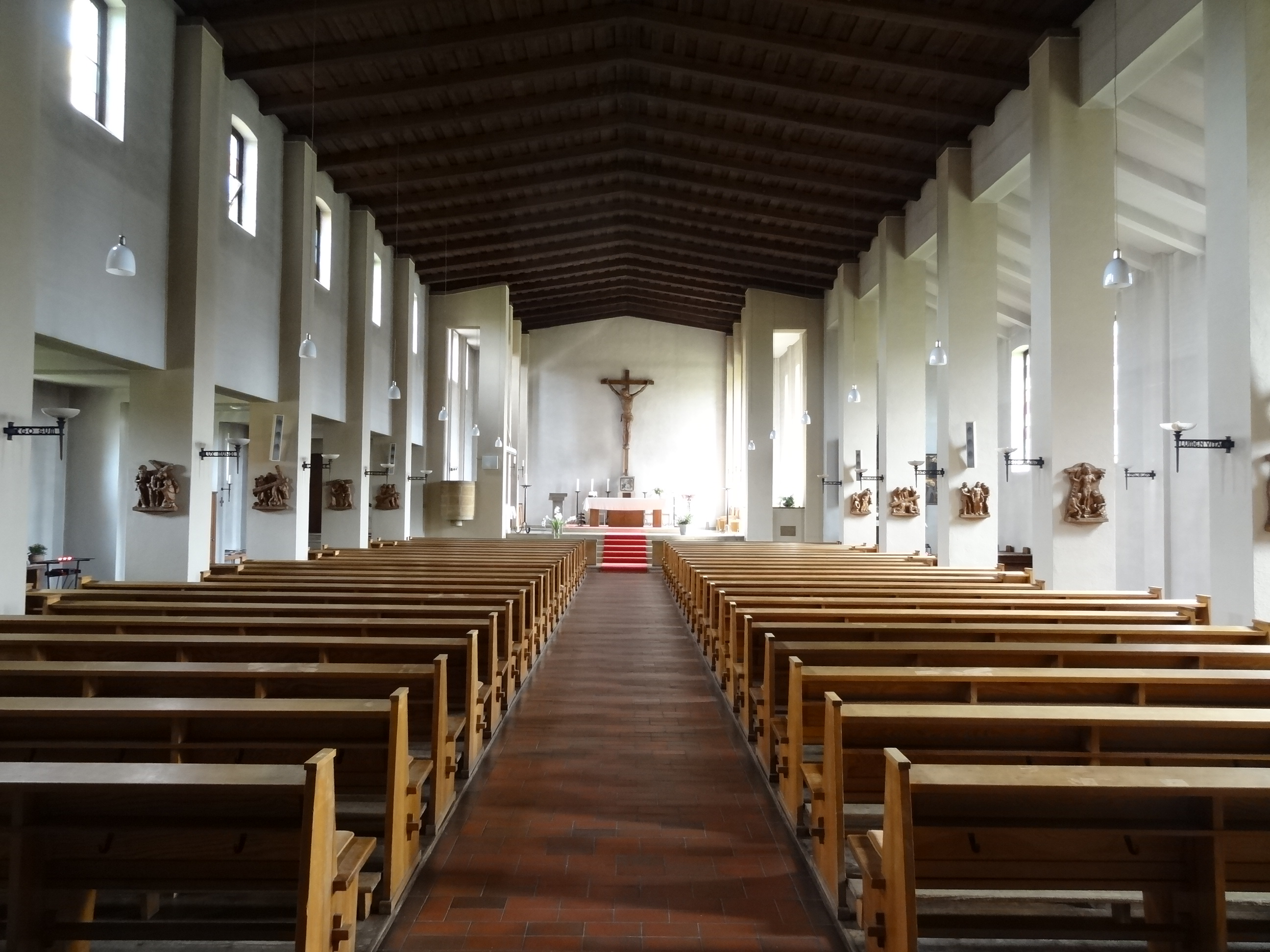 St. Gottfried (Butzbach)